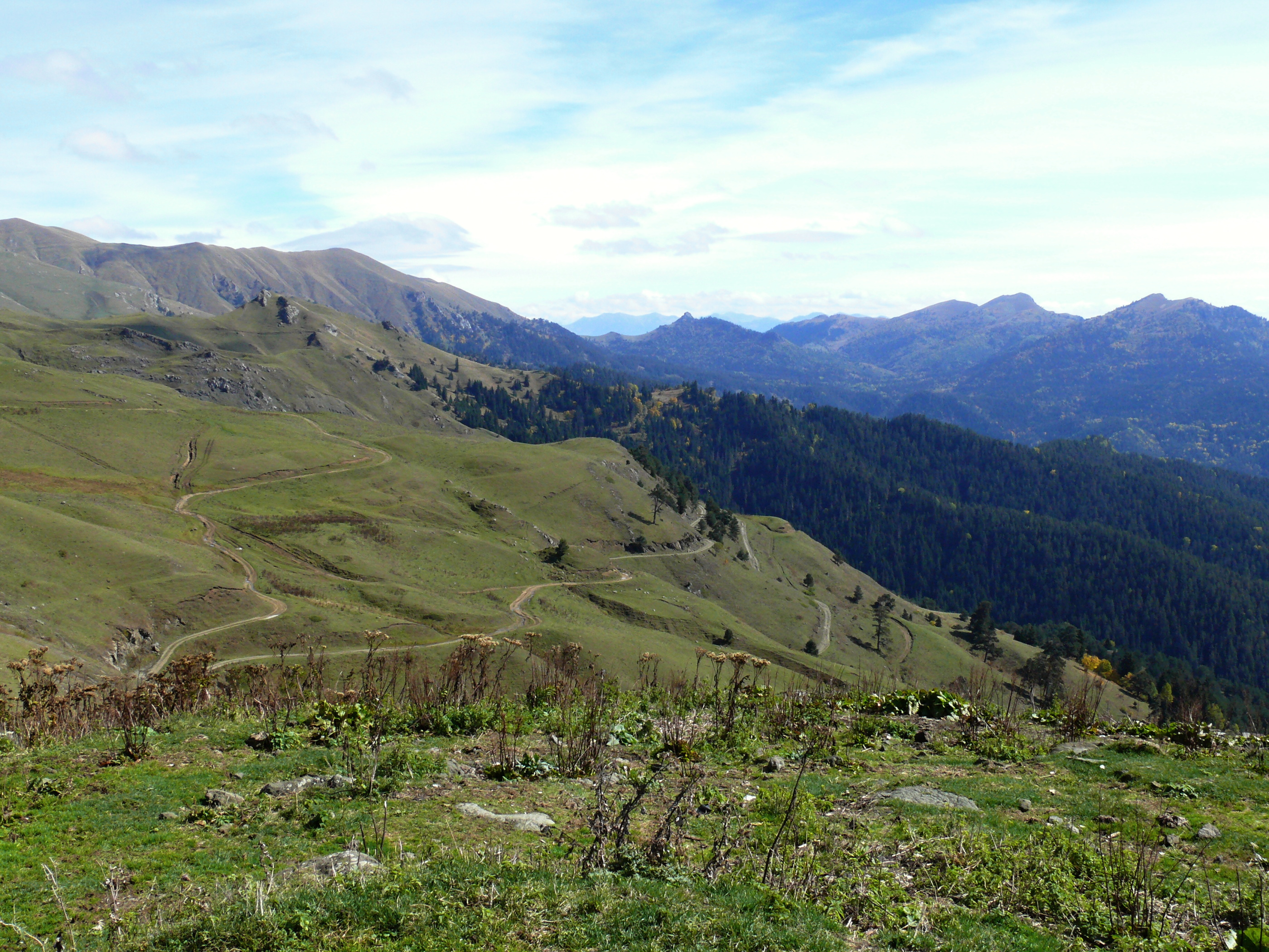 Cesta ze sedla jižním svahem do Abastumani.